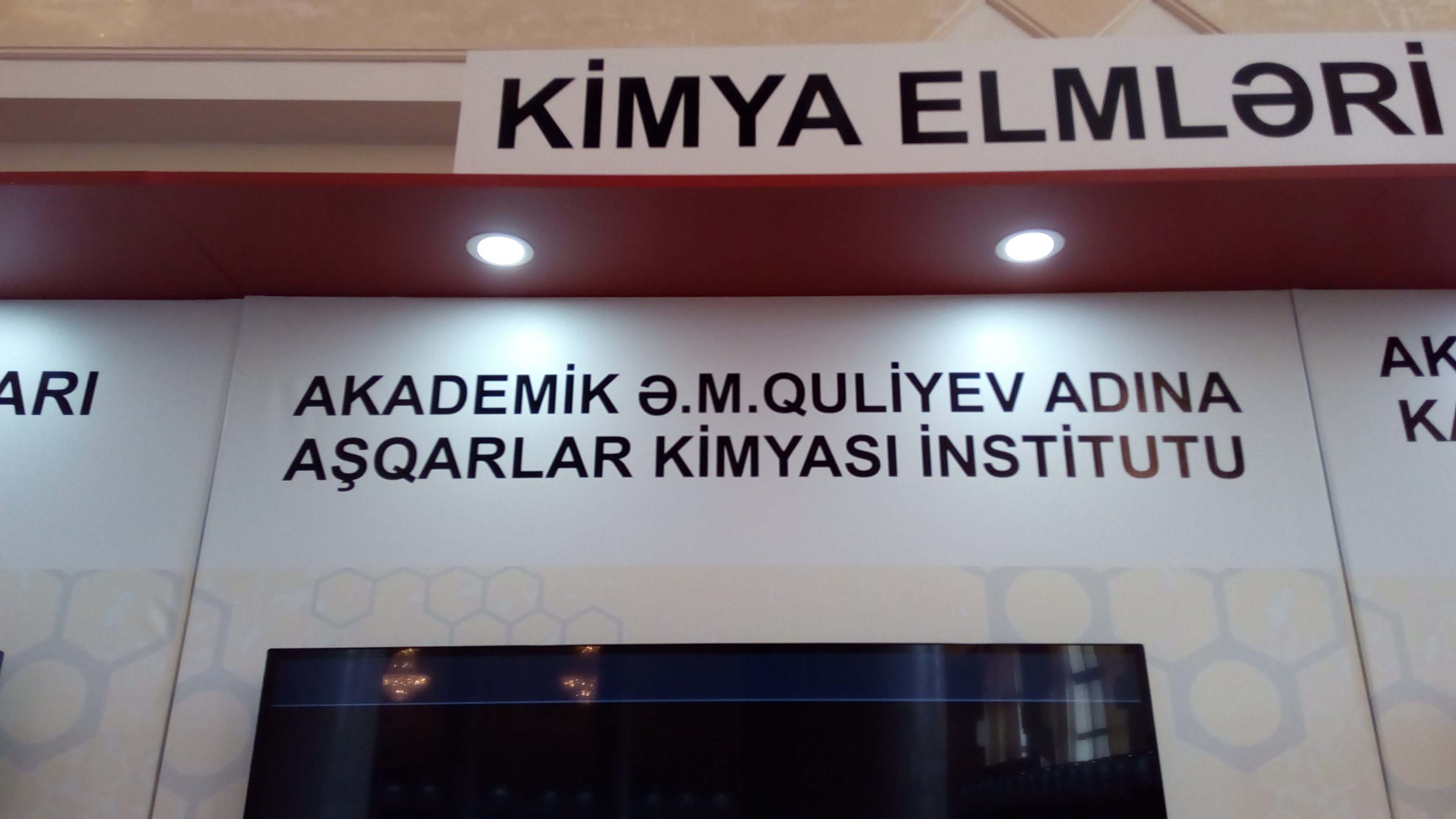 AMEA-nın sərgisi